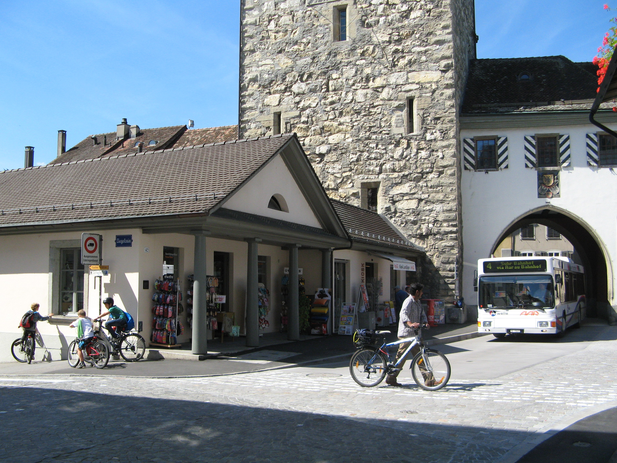 Oberes Tor und Landjägerwache in Aarau, mit BBA-Bus